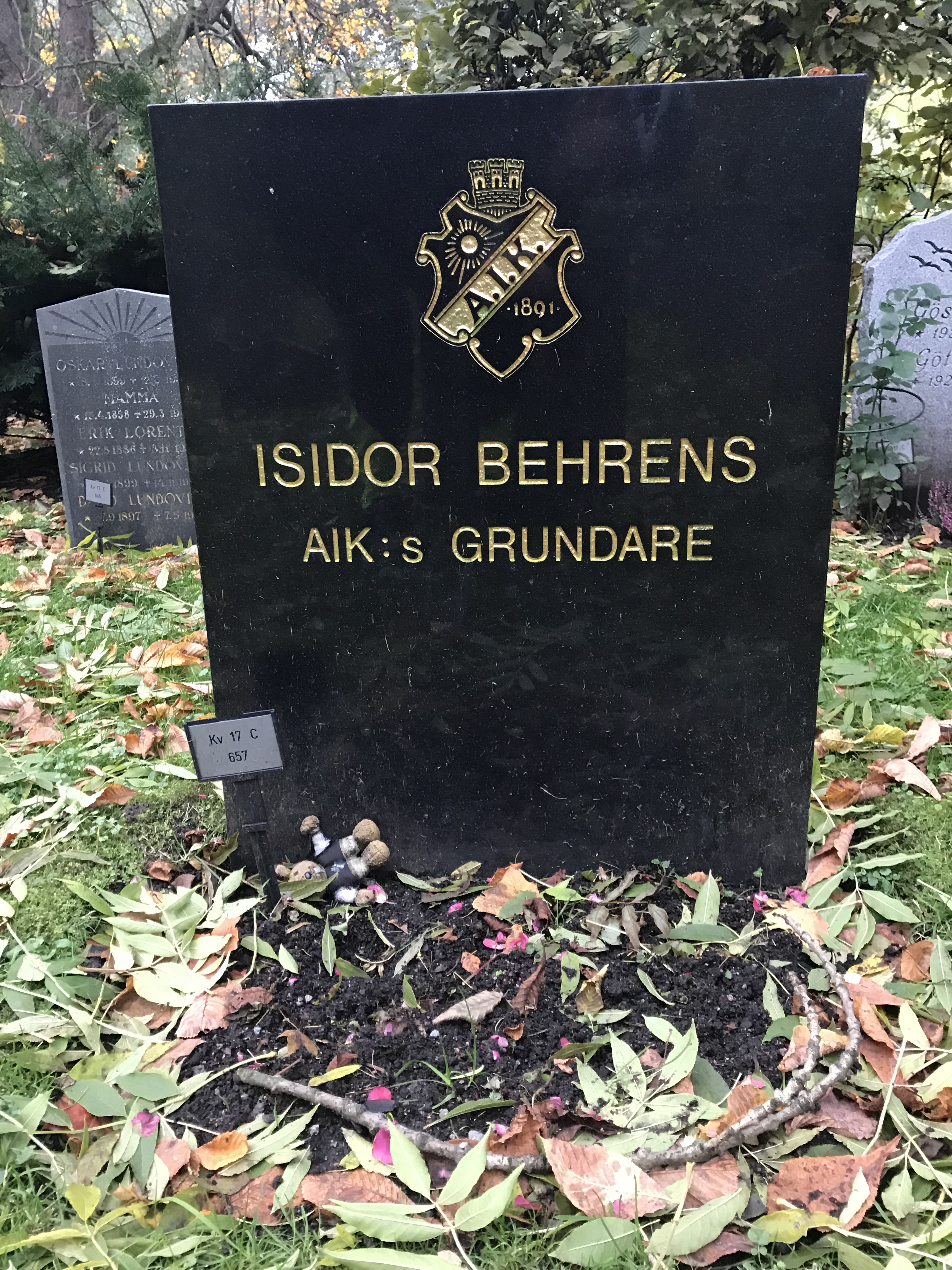 Isidor Behrens